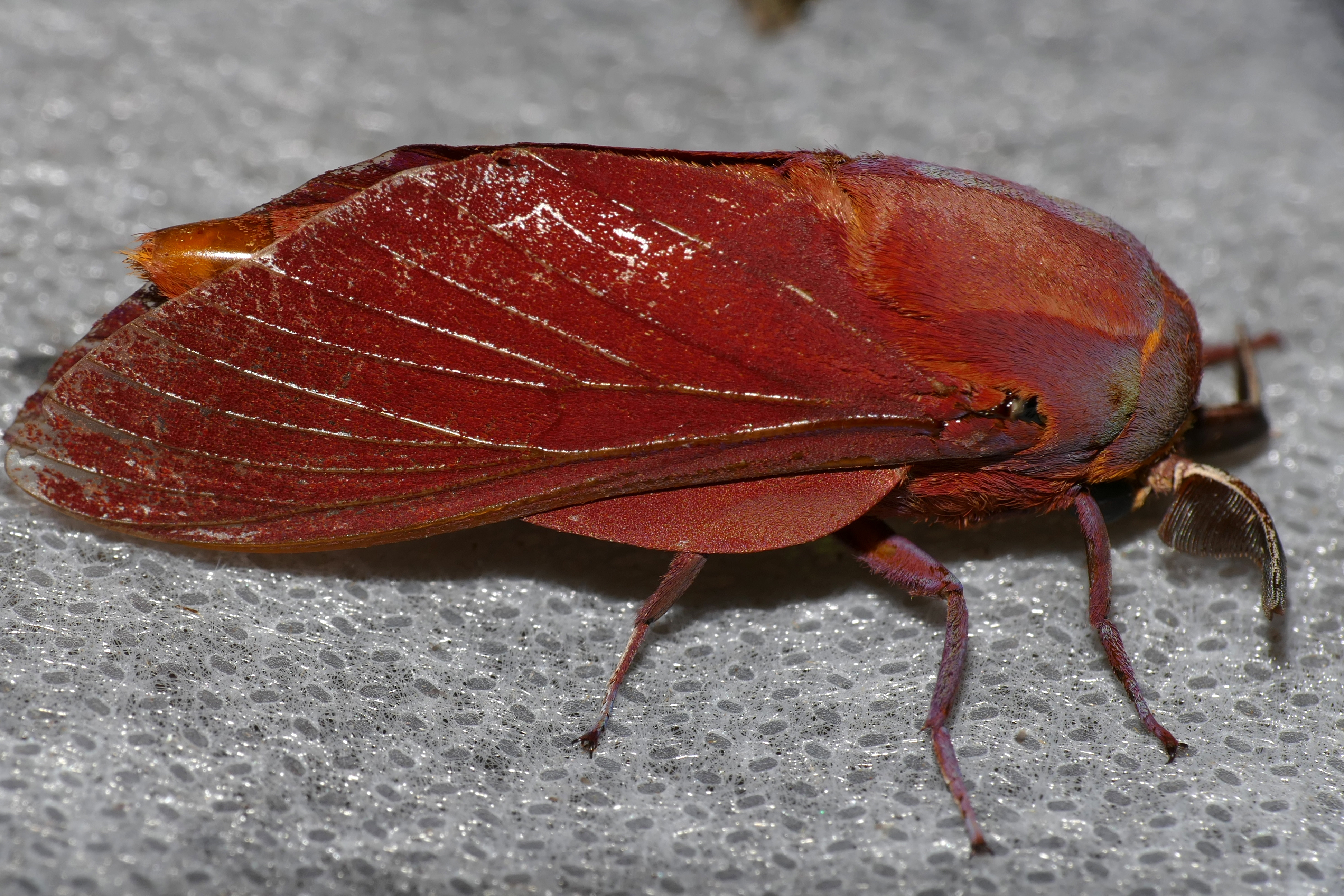 Letaba Camp, Kruger NP, SOUTH AFRICA